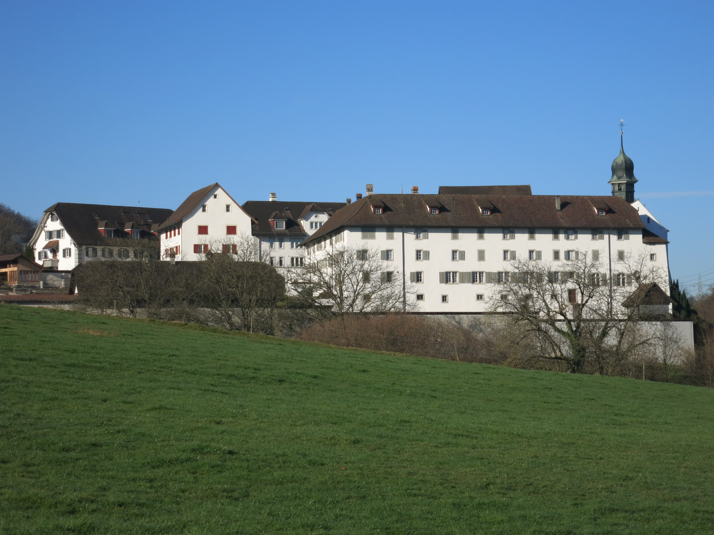 Kloster Hermetschwil AG, Schweiz